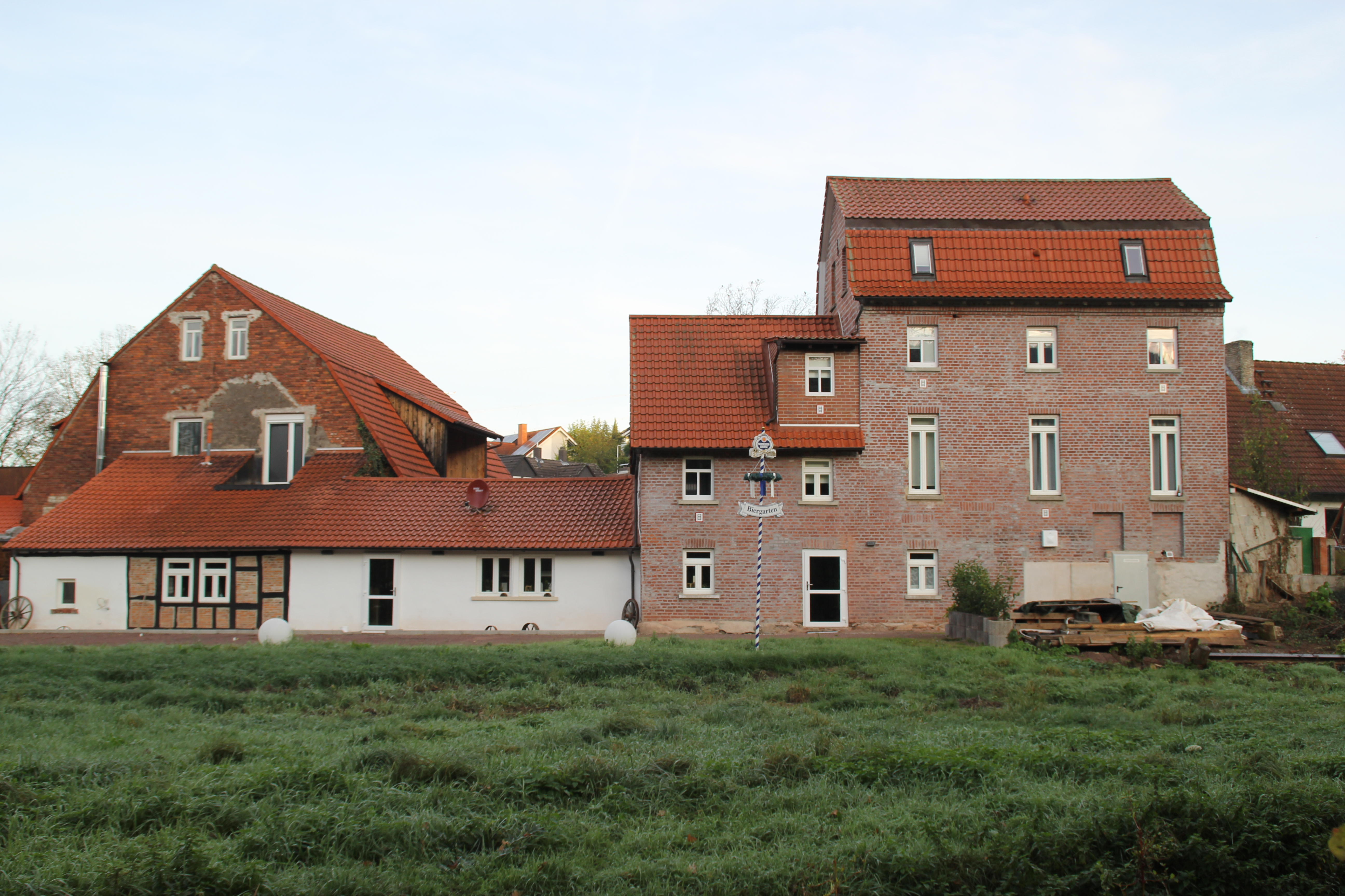 Die Gebäude der ehem. Kälberauer Mühle